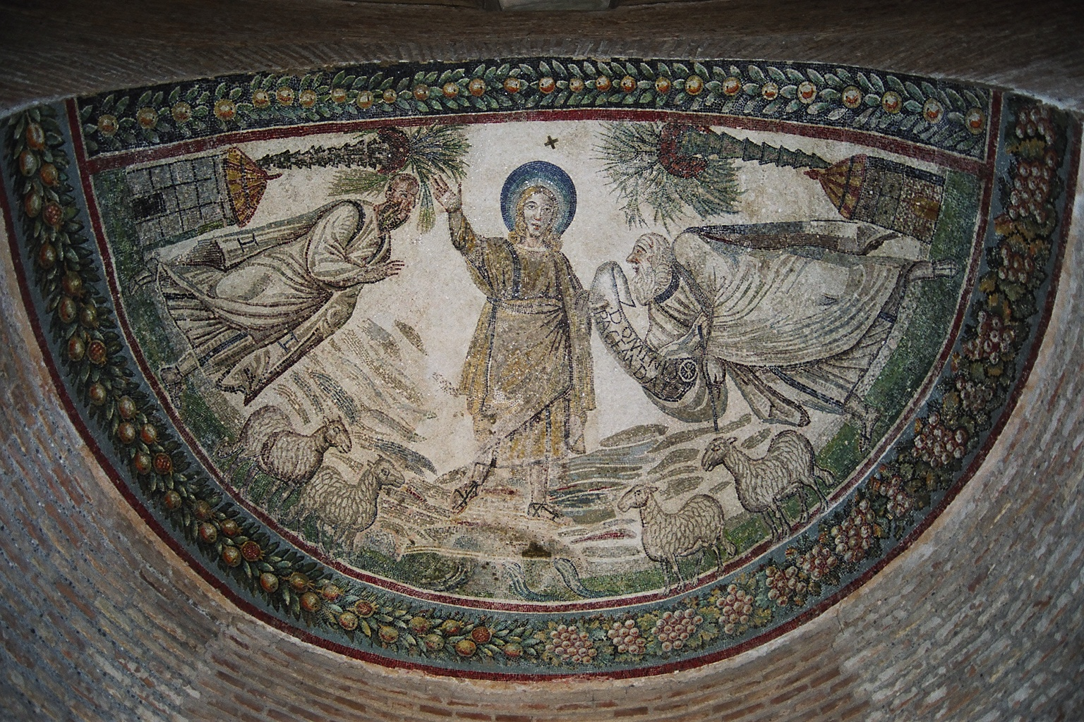 descripcióMausoleu de Santa Costanza. Roma. Mosaic "Traditio Legis".